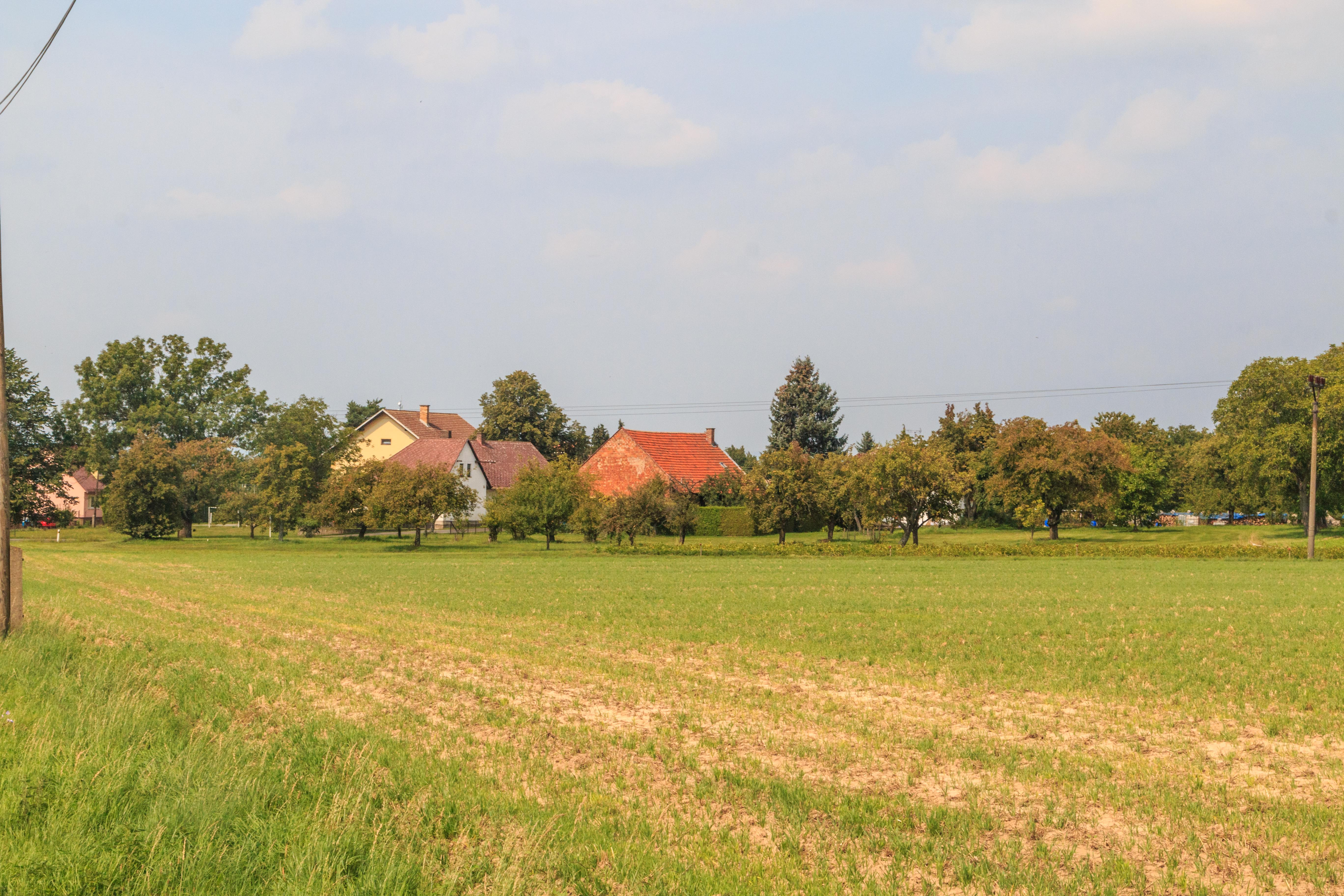 Chlístov u Dobrušky - pohled ze silnice od Valů